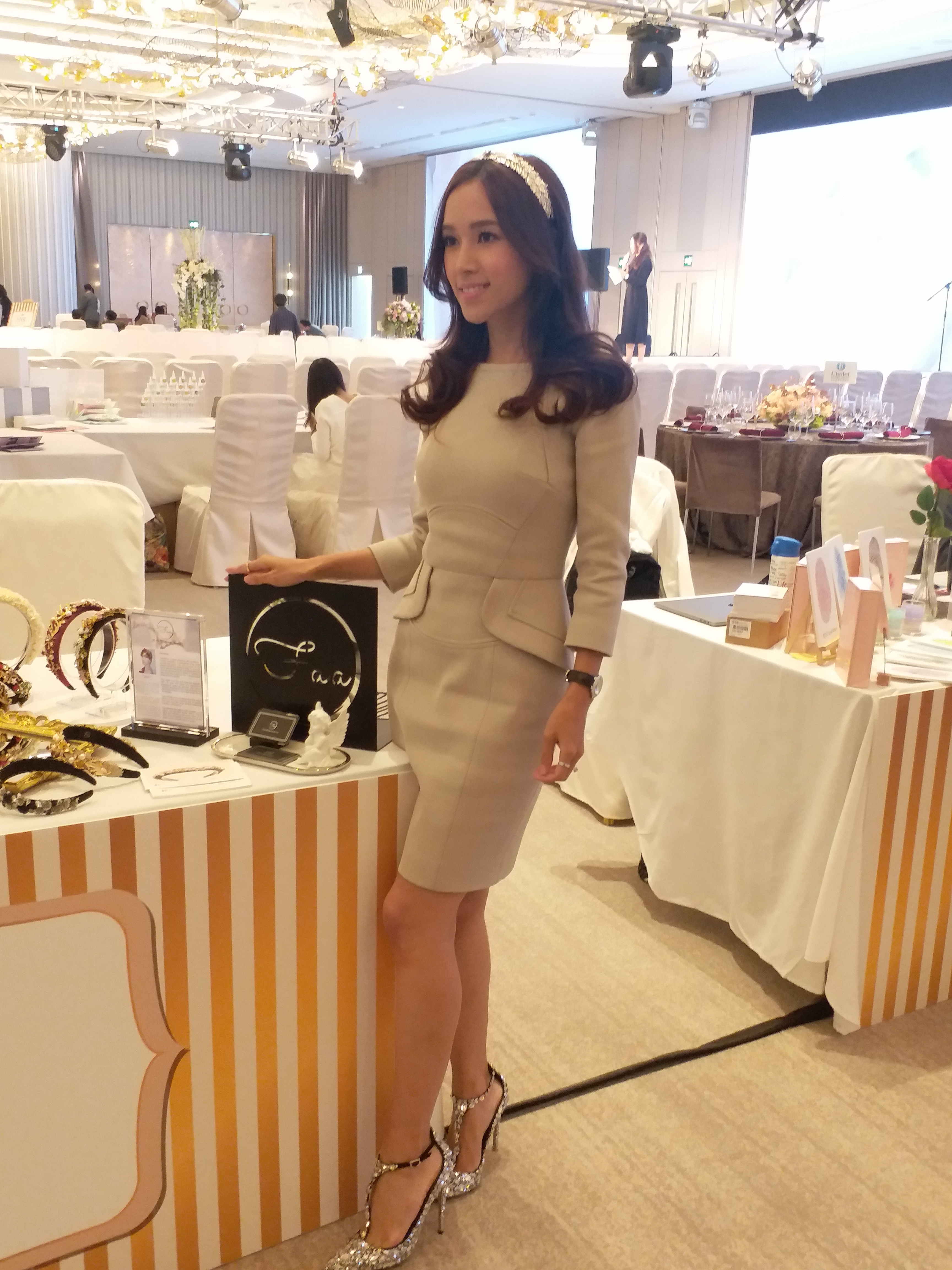 2019年11月10日(荃灣如心海景酒店暨會議中心)